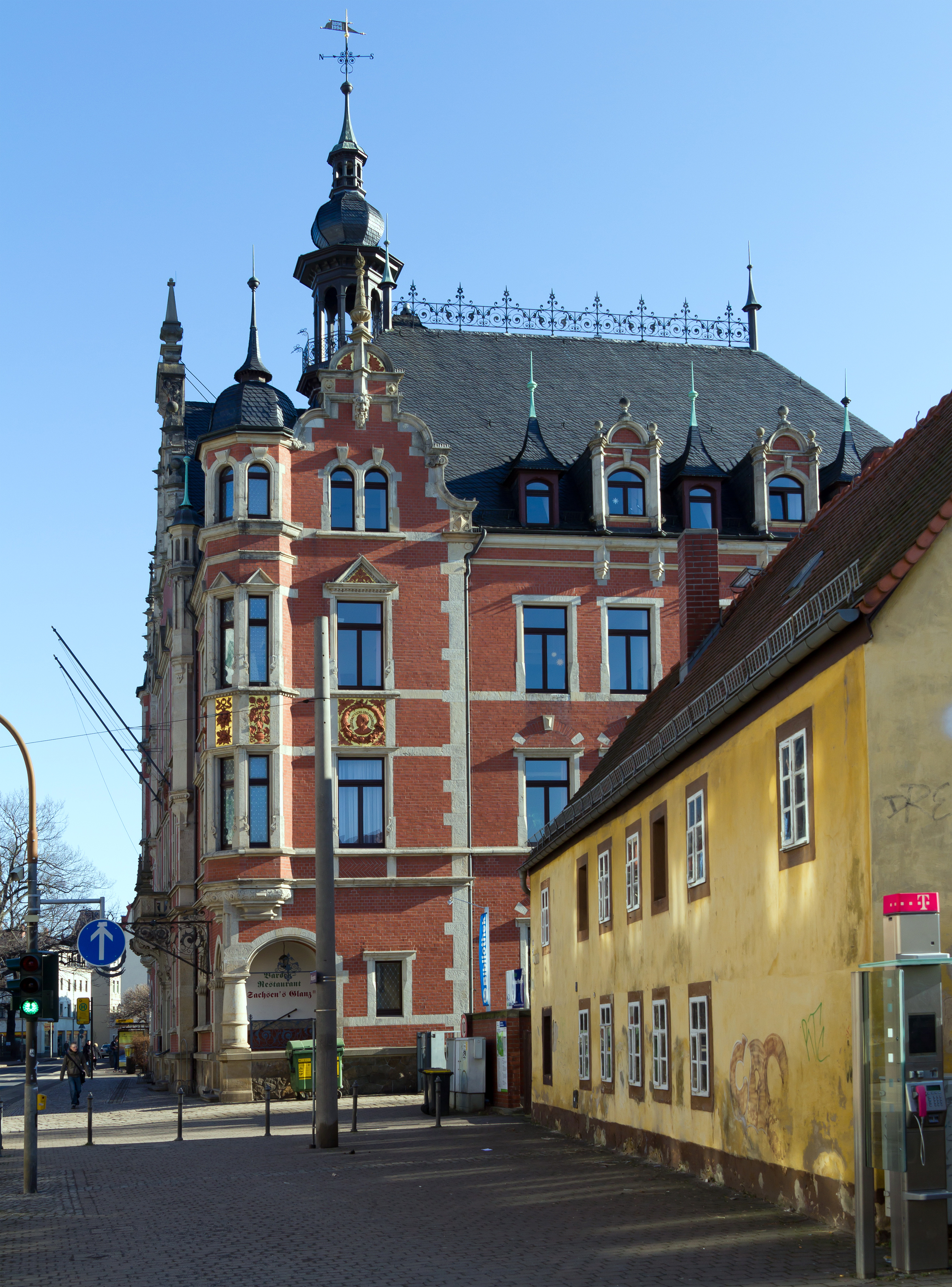 Rathaus Pieschen, Ansicht von Westen